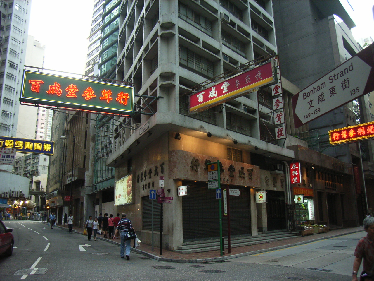 文咸街是香港上環兩條街道的名稱，分別為「文咸東街」及「文咸西街」，道路以第三任香港總督文咸命名。